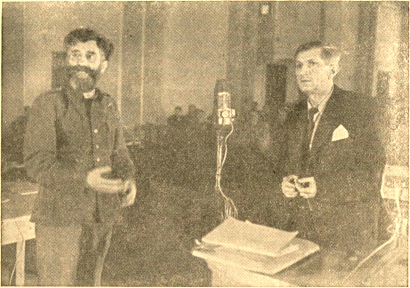 Српски (ћирилица): Суочење Драже Михаиловића и Драгомира-Драгог Јовановића.